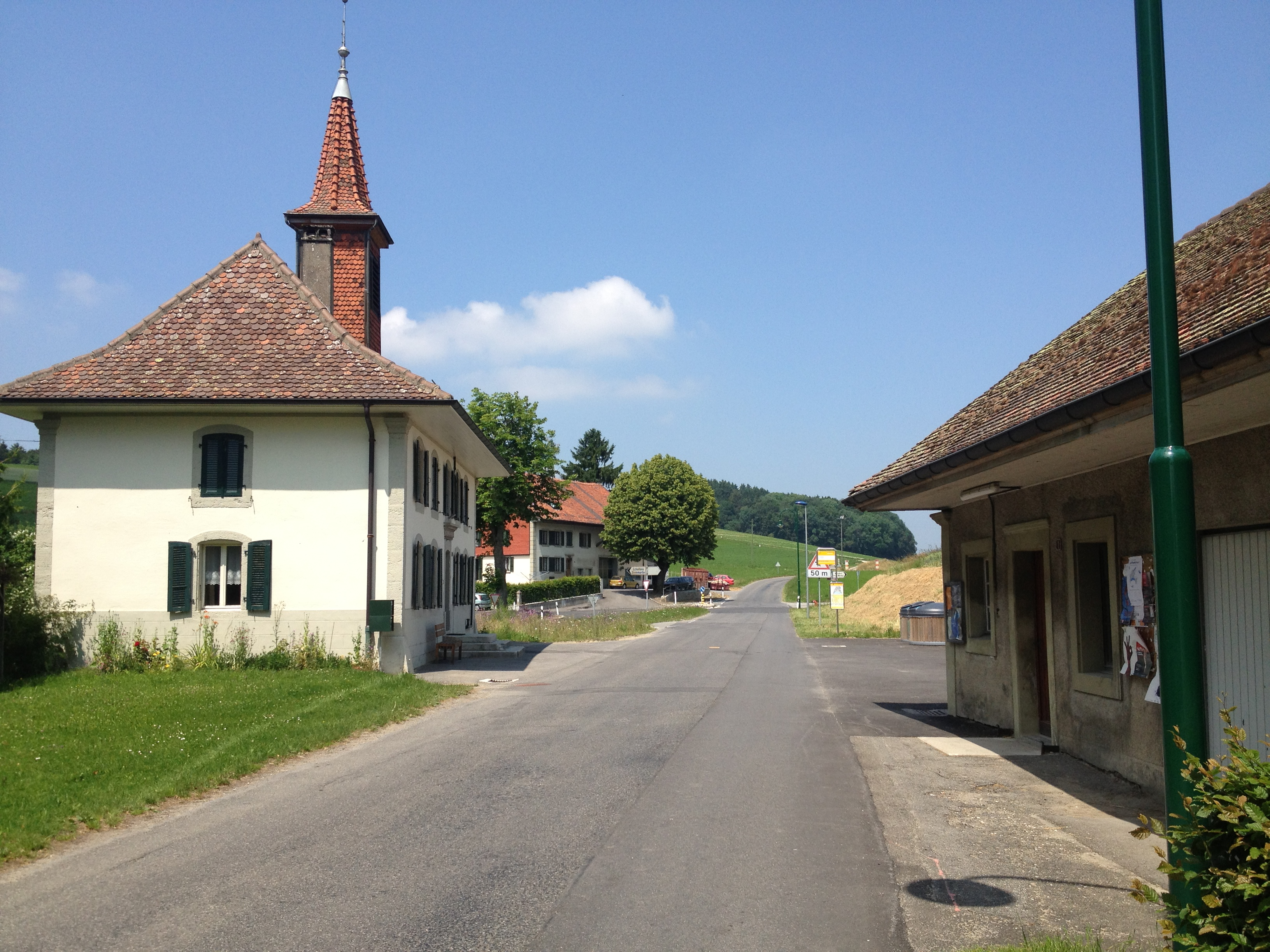 Montaubion dans la commune de Jorat-Menthue en Suisse.